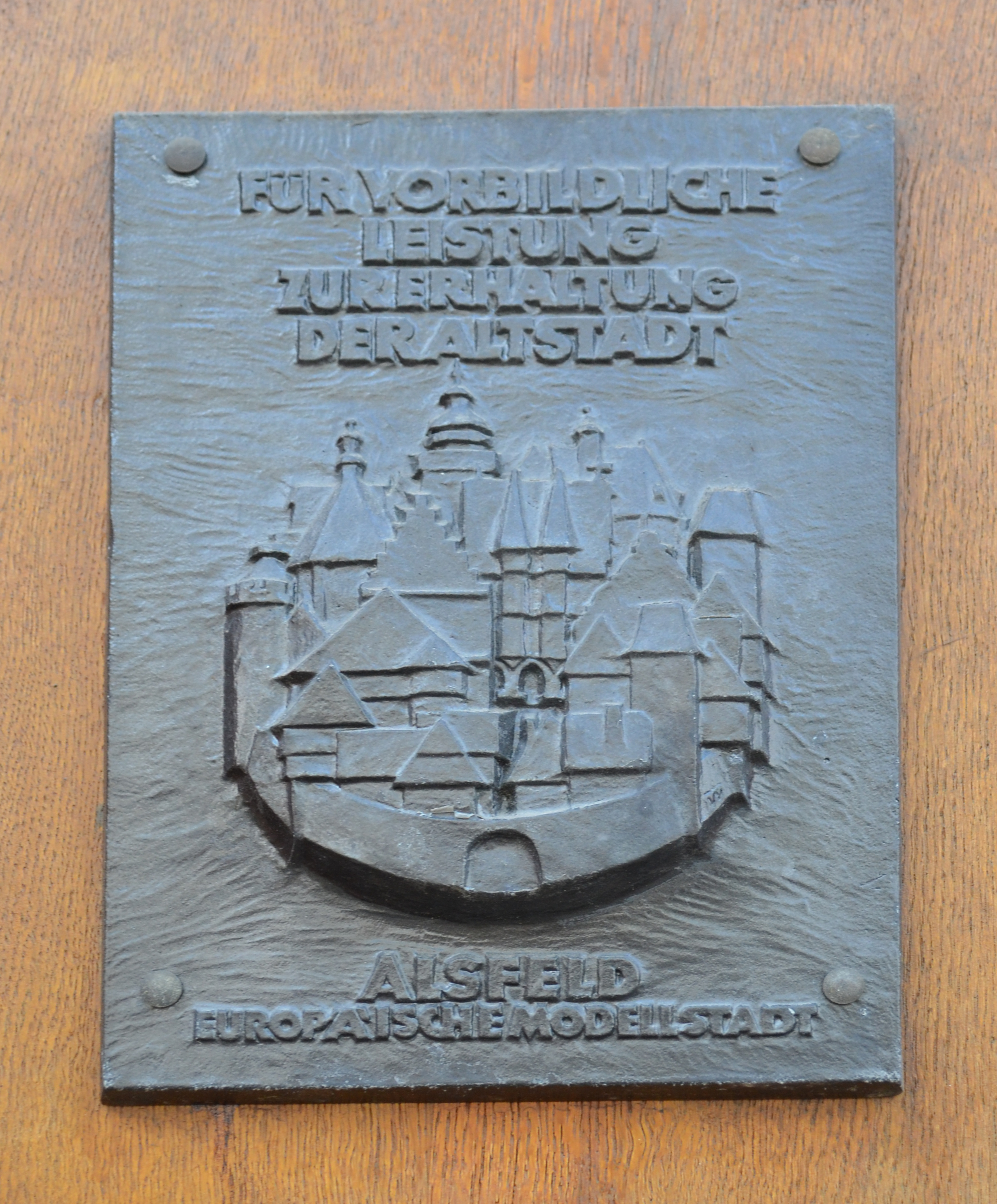 Alsfeld, Plakette Vorbildliche Leistung Denkmalschutz